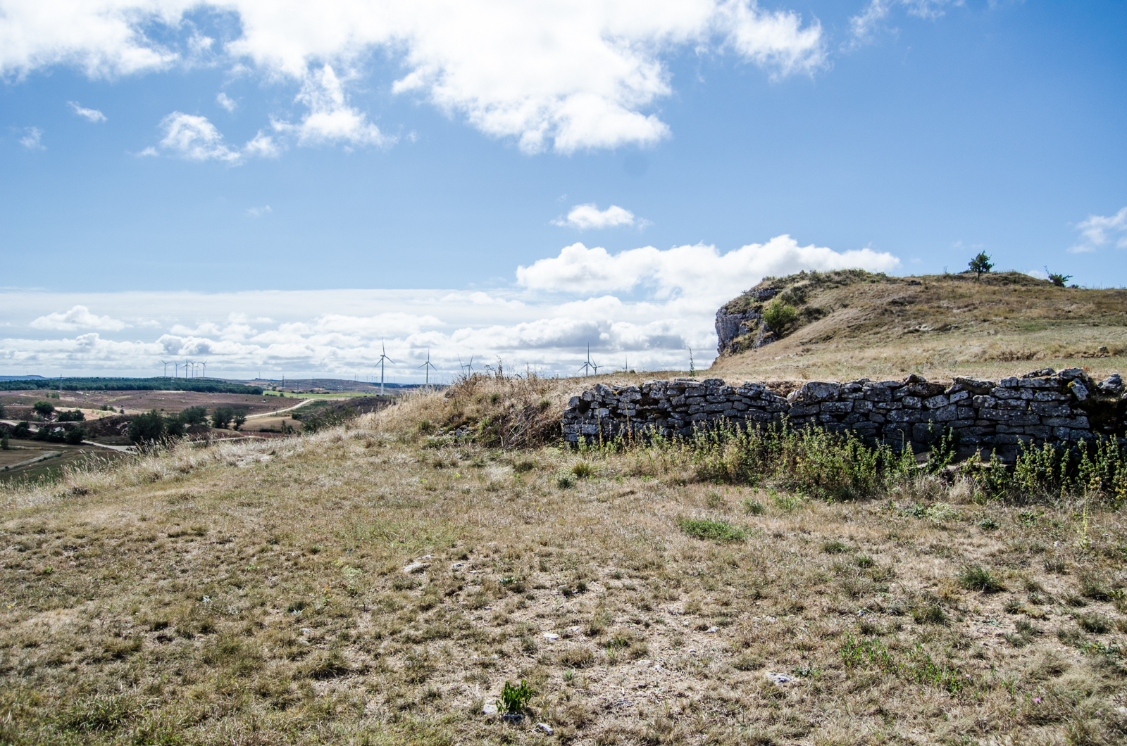 Acedillo. Loma del El Castillo. 2015